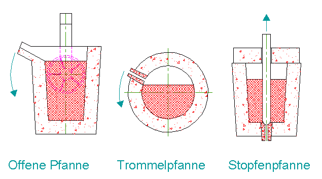 Schematische Darstellung Giesspfannen